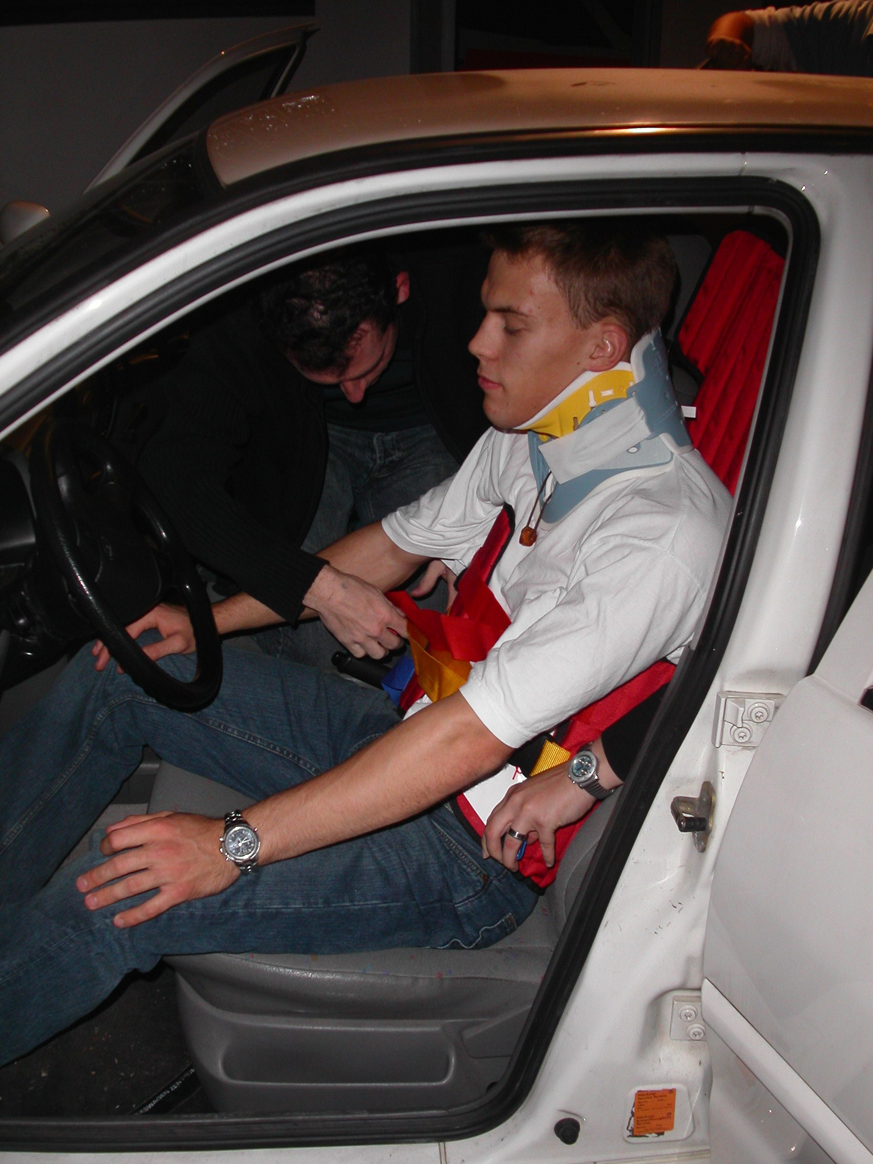 Rettungskorsett (KED-System) in Anwendung